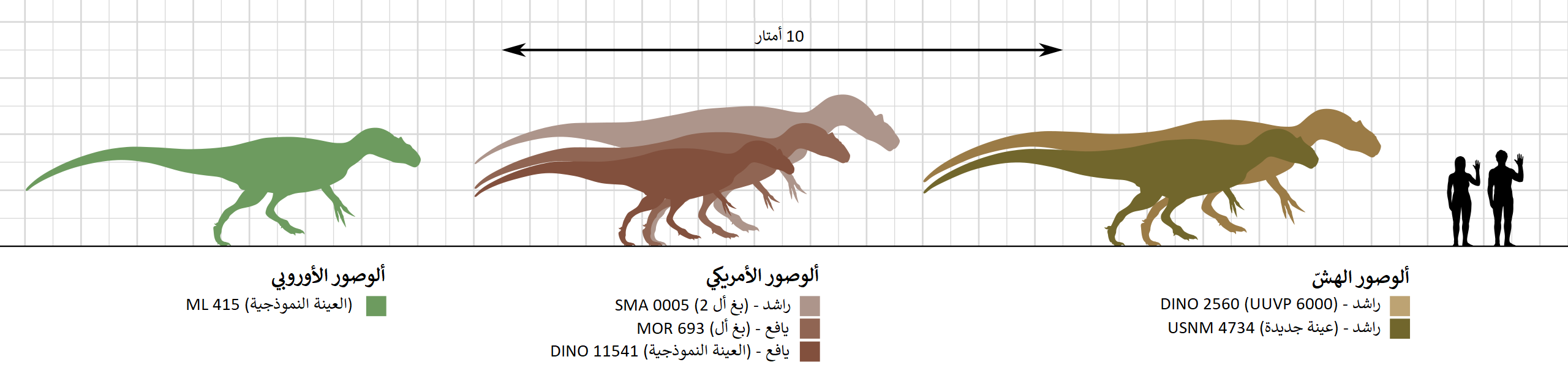 مقارنة بالحجم بين سلالات الألوصور.